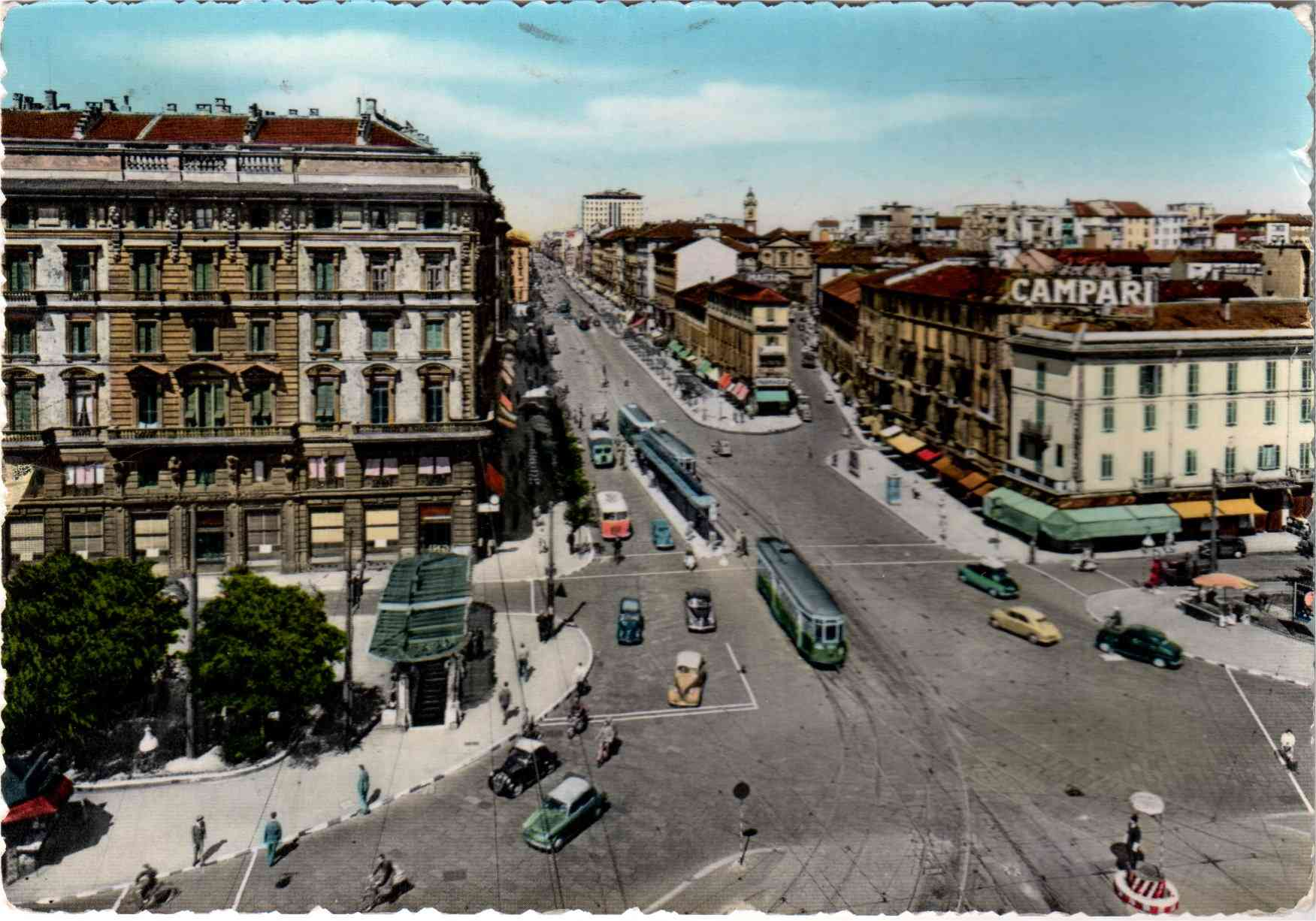 MI Milano corso Buenos Ayres